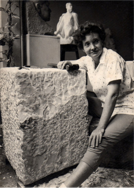 Edith Gron en su estudio trabajando el busto de Rubén Darío